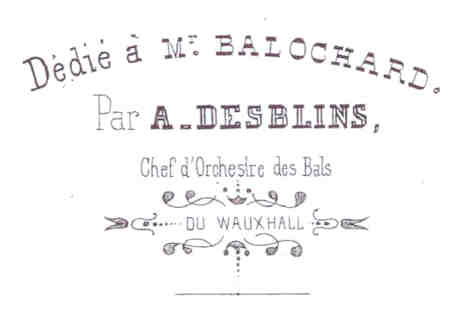 Dédicace du quadrille de Auguste Desblins "Monsieur Chicard" (détail de la couverture de la partition imprimée).